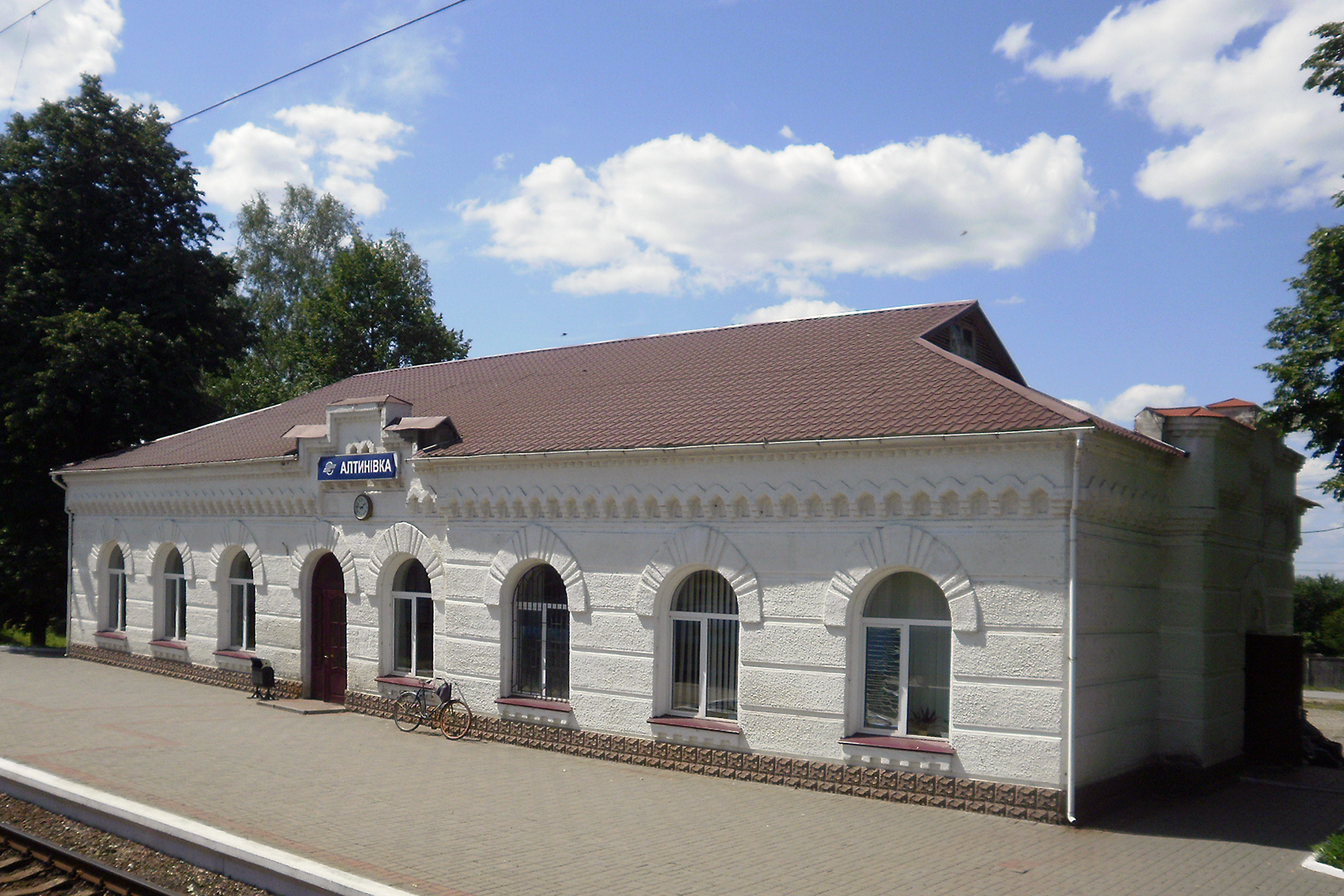 Вокзал Алтыновка